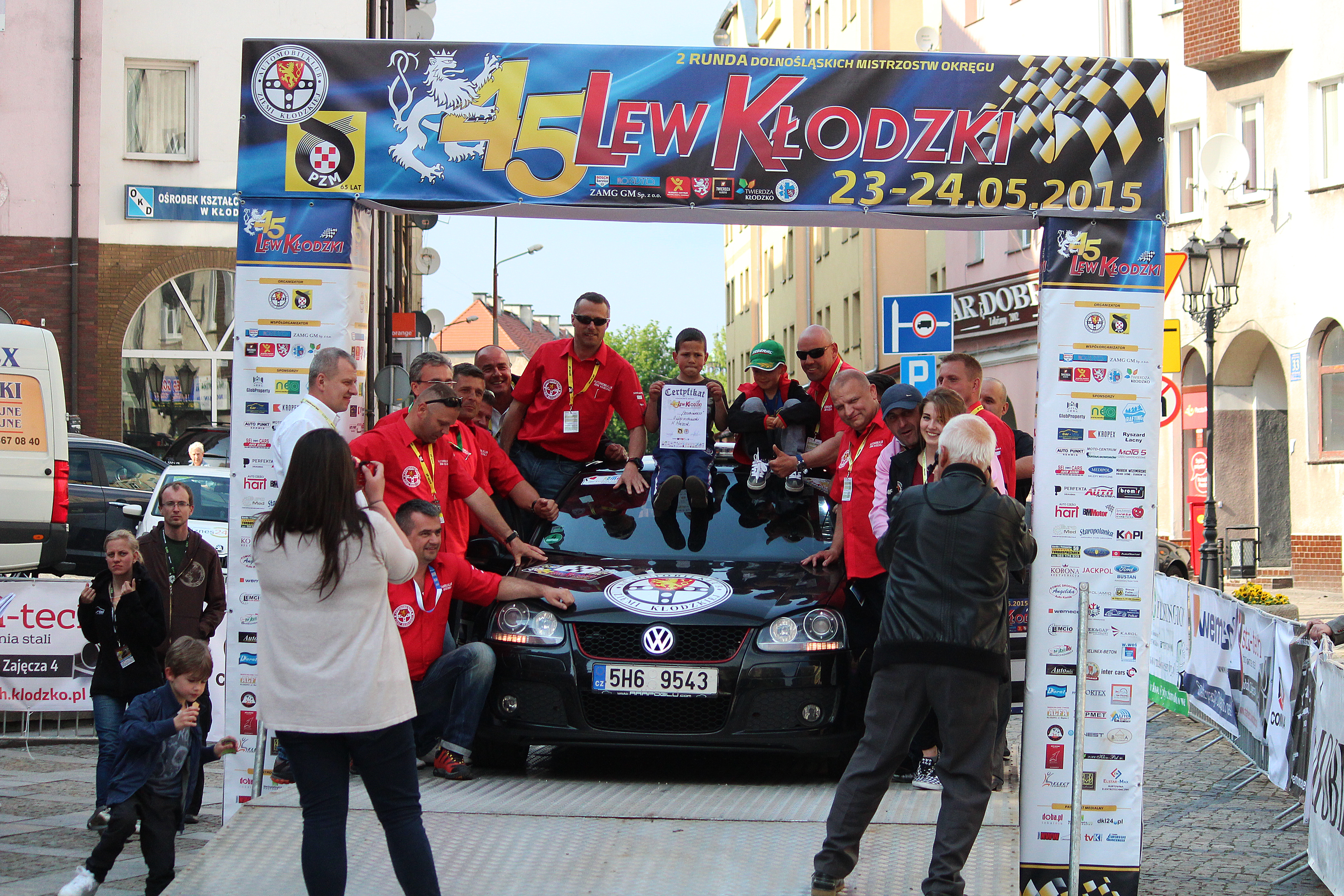 Meta 45 Lwa Kłodzkiego - rynek Kłodzko